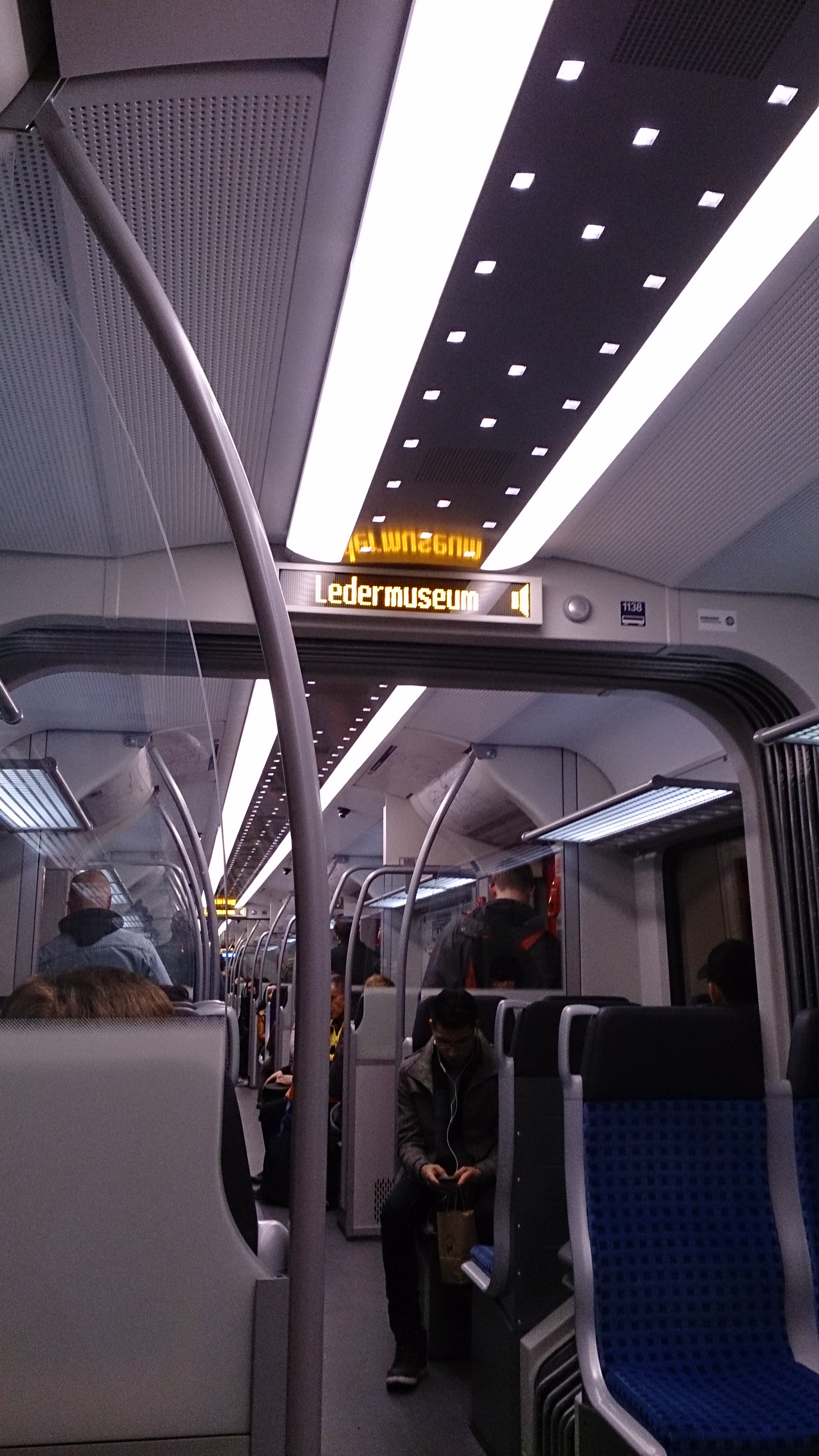 Innenansicht eines ET430 der S-Bahn in Offenbach am Main